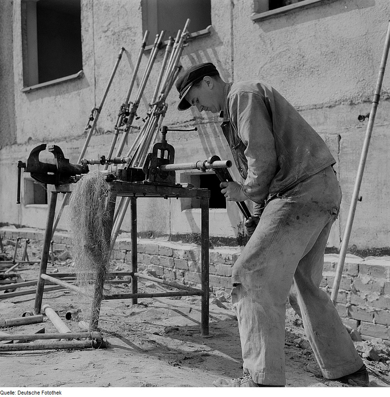 Original image description from the Deutsche FotothekInstallateur montiert Rohrverbindungen an einem transportablen Montagetisch im Freien